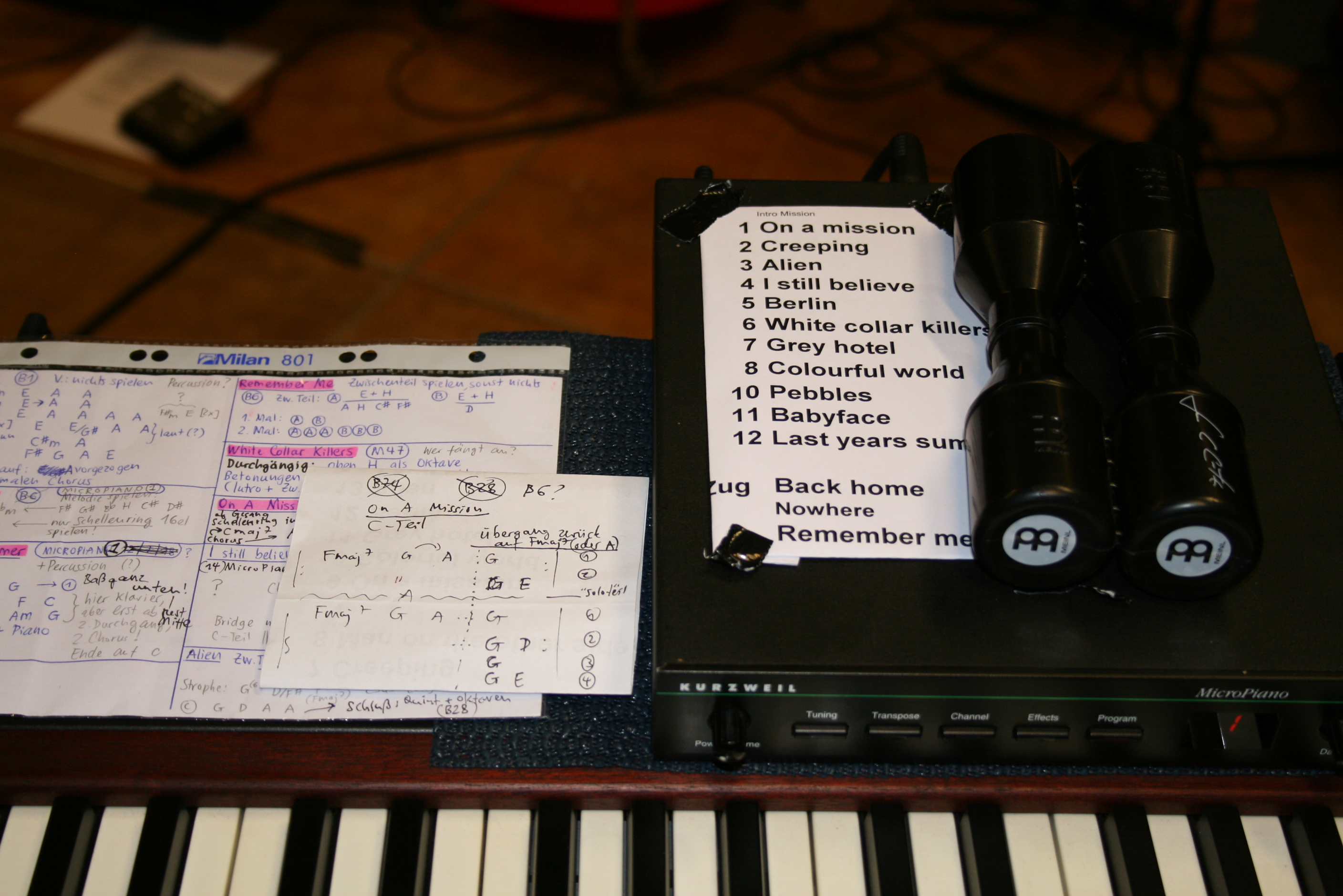 Pilotshop Live @ Kulturwerk Nienburg, Sat 14 June 2008 Kurzweil MicroPiano